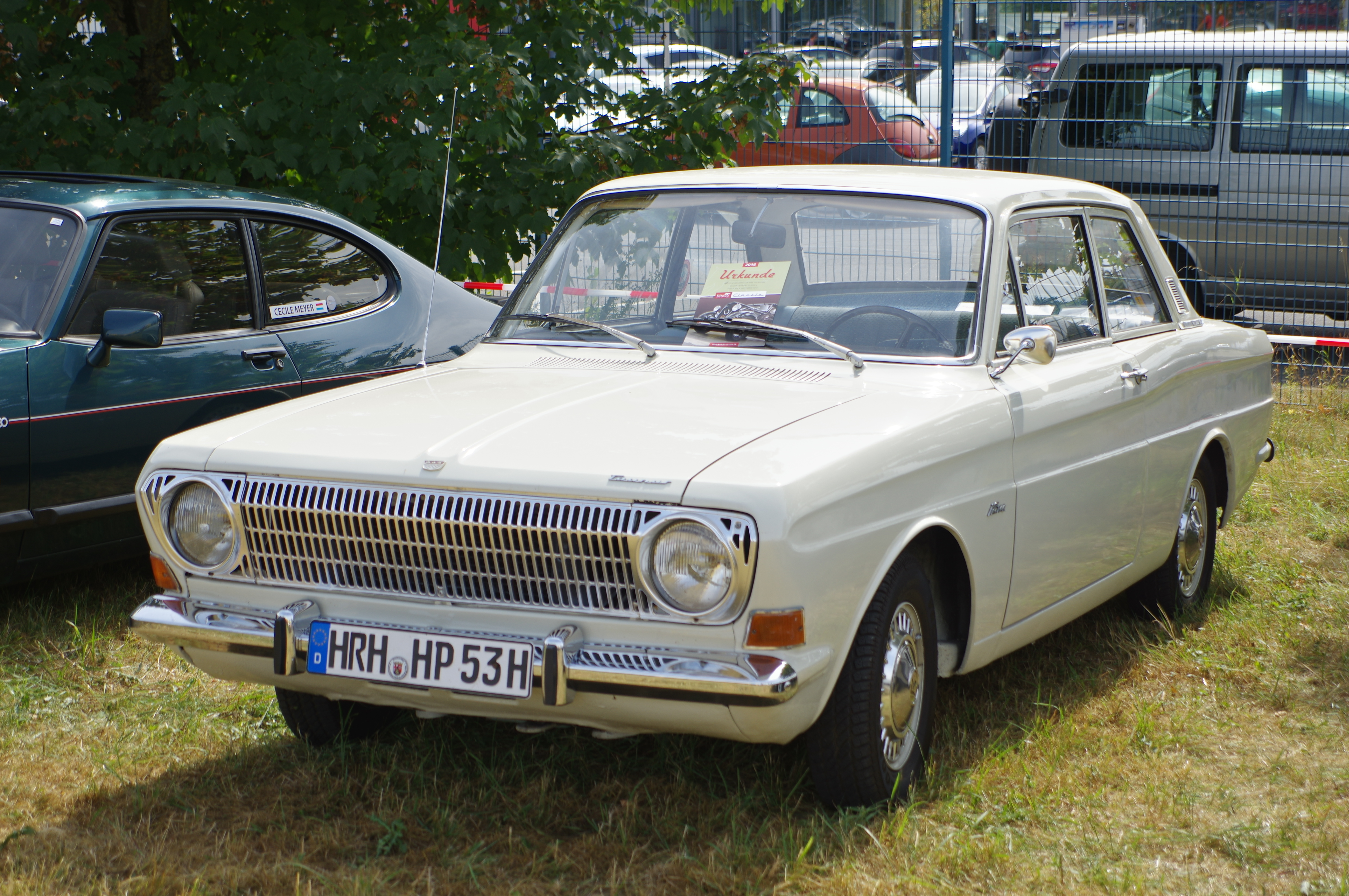 Ford Taunus P6 12m, 1968, 1288 cm³, V4, 50 PS , Bitburg Classic 2016, Das Nummernschild ist verfälscht!